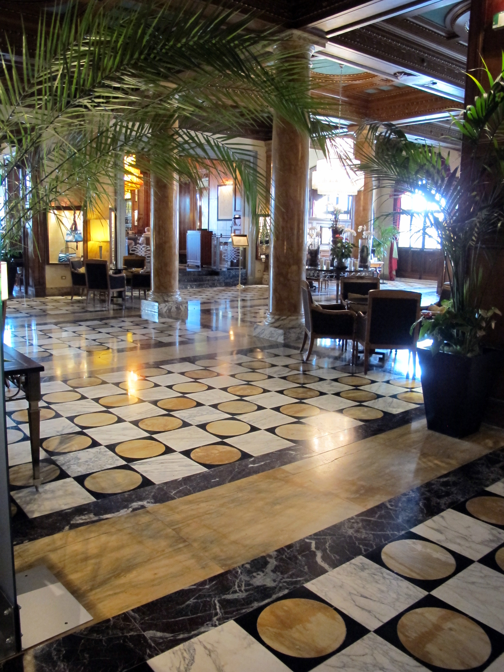 Hotel excelsior, interno